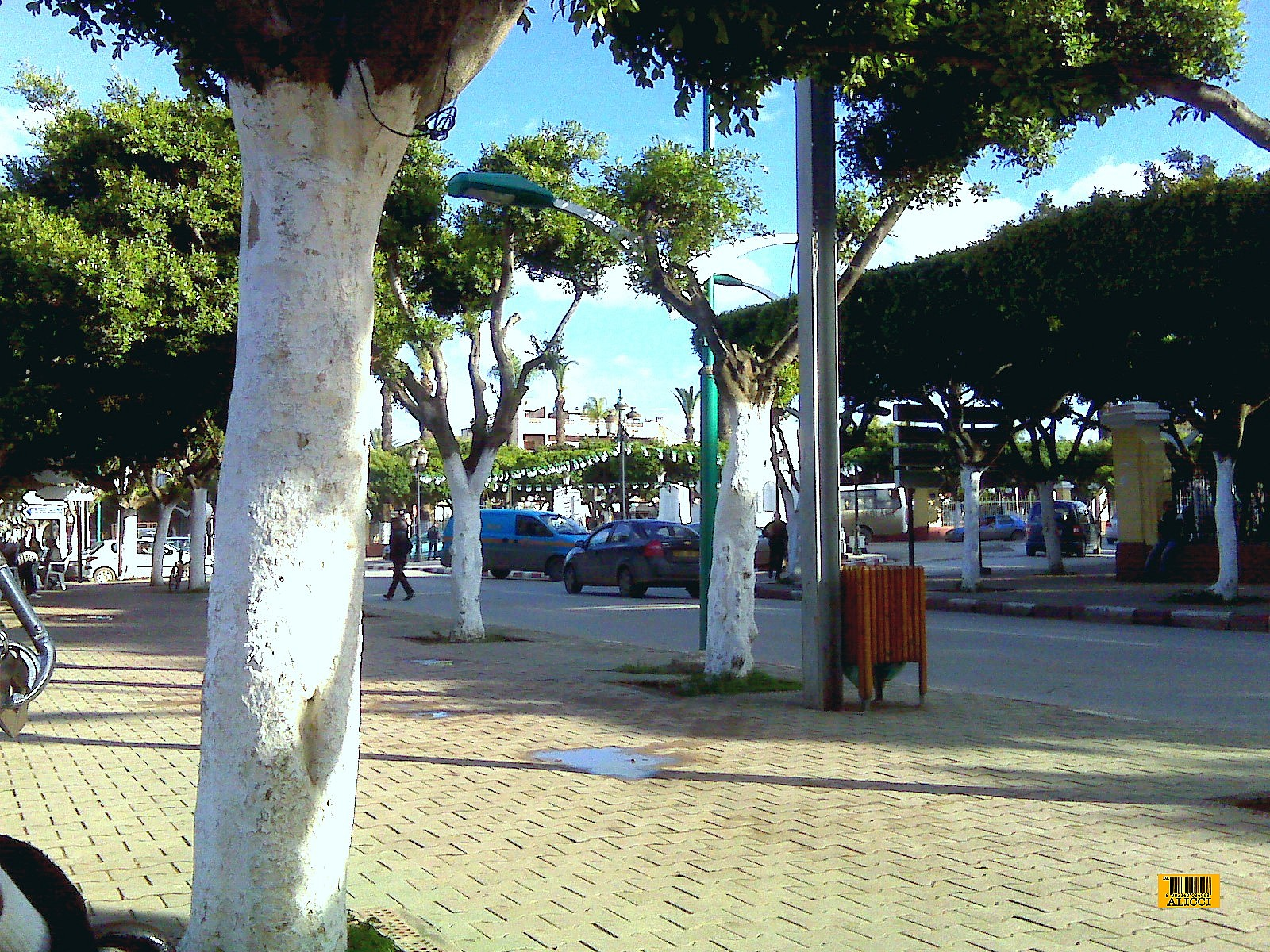 le Centre ville de Hadjout